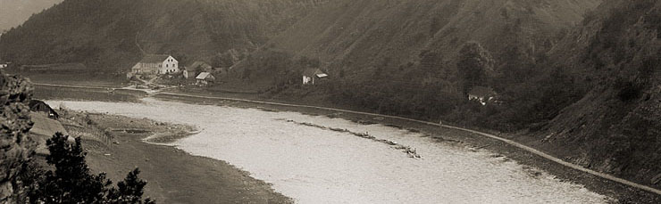 Pohled na Moráň